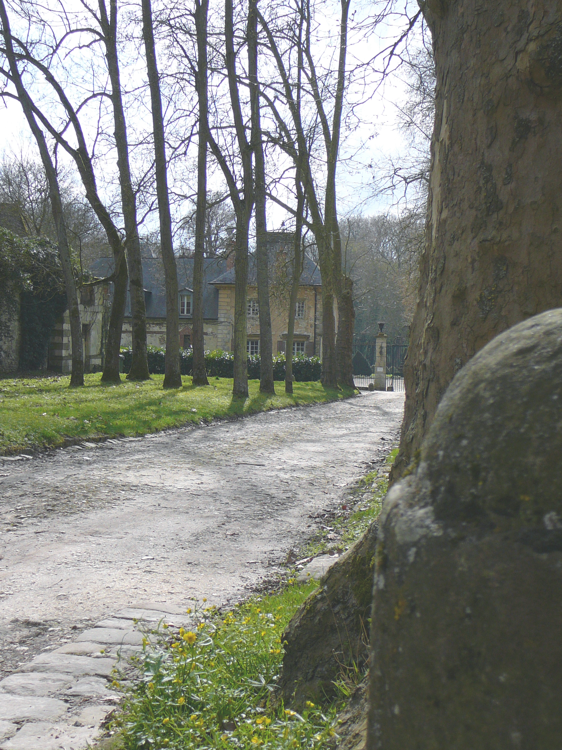 Château du Saussay de Ballancourt-sur-essonne